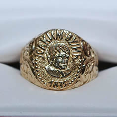 Prsten Joakim Vujic